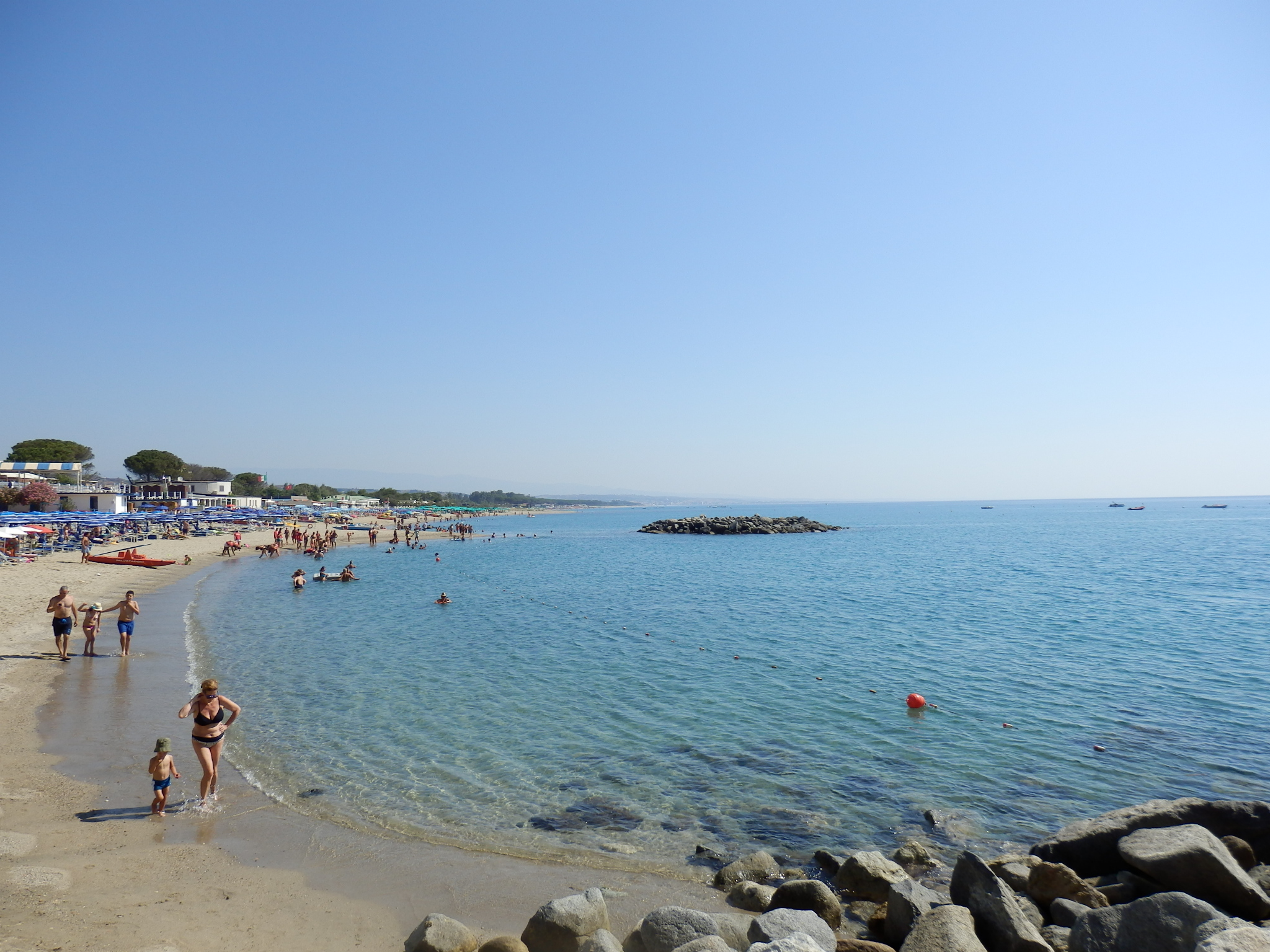 La plage